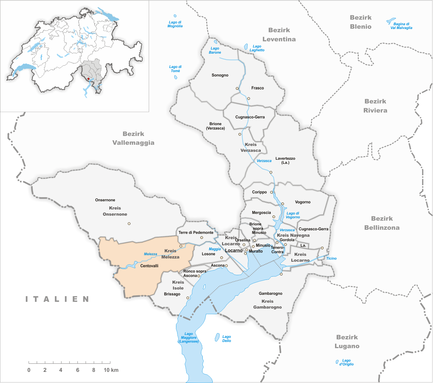 Municipality Centovalli